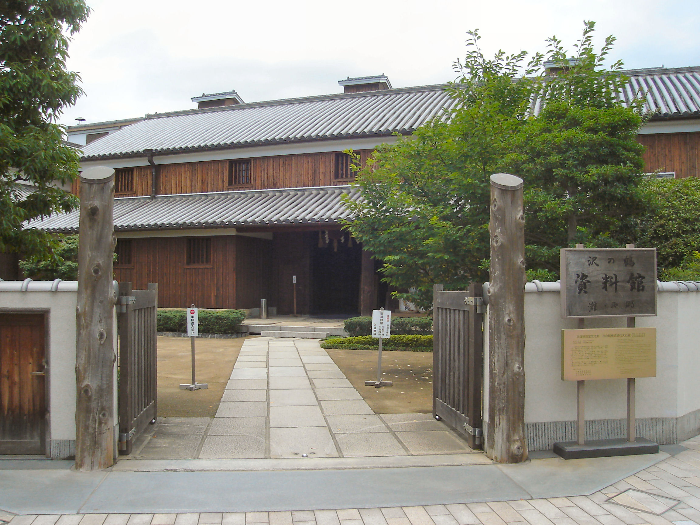 SawanoTsuru Shiryoukan (沢の鶴資料館), Kobe Japan